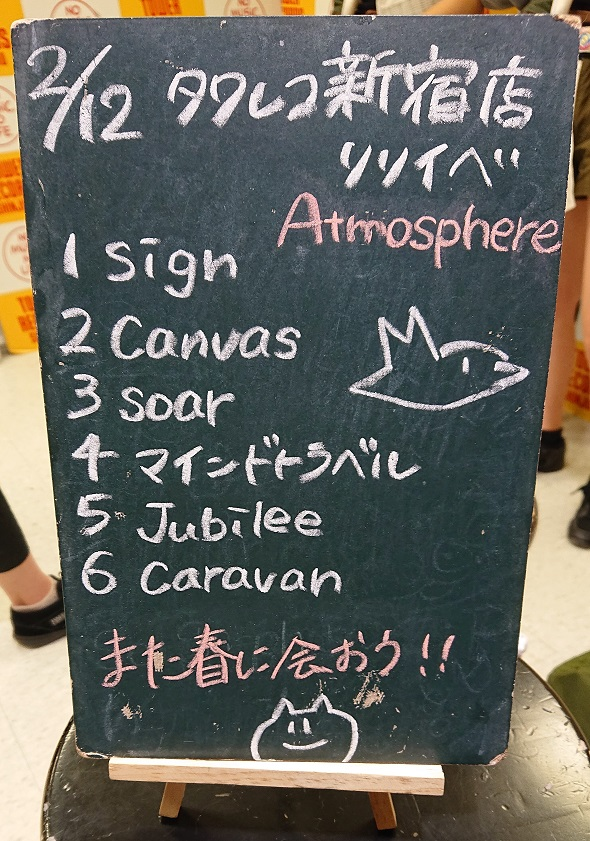 amiinAセトリボード